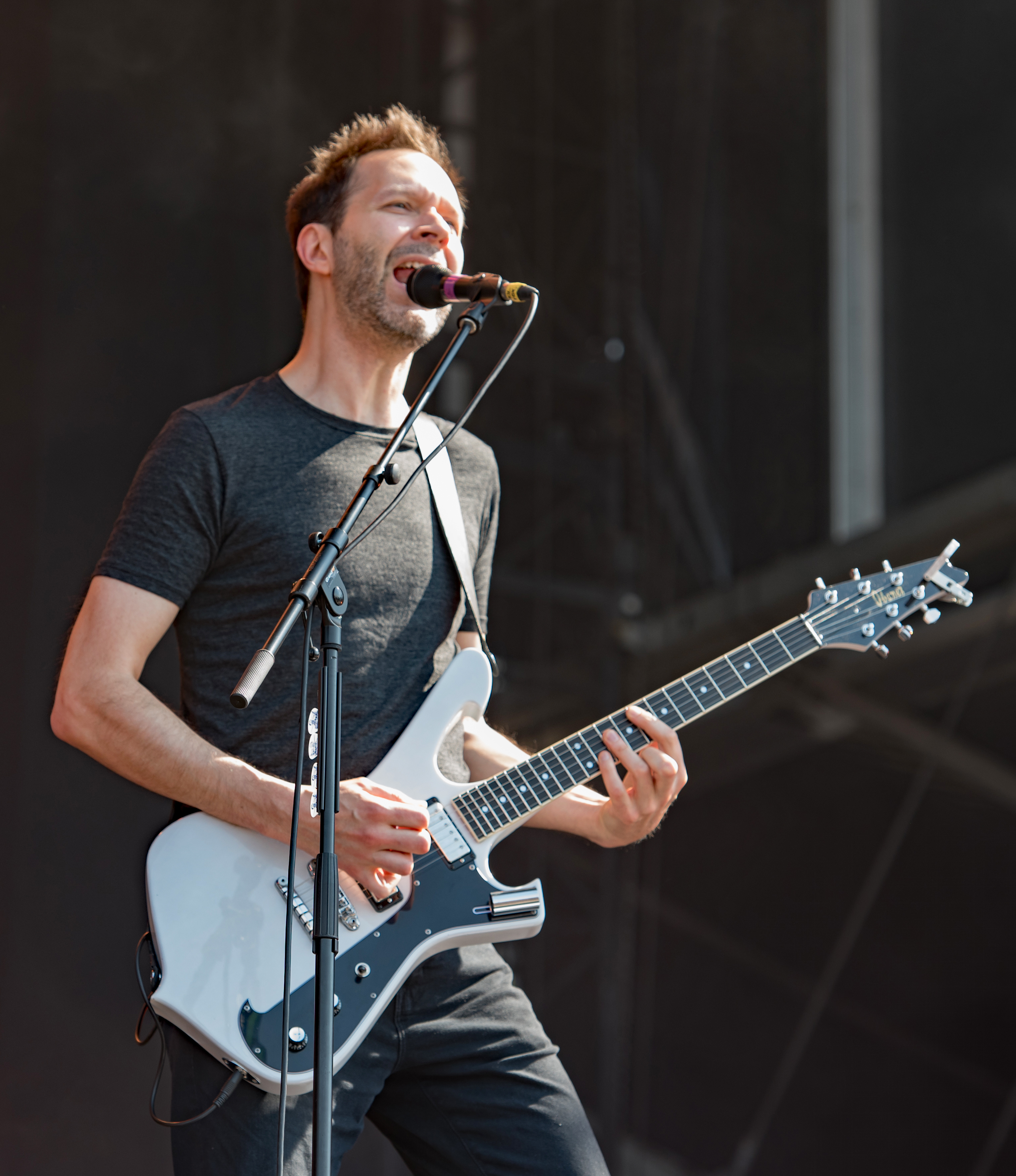 Mr. Big beim Wacken Open Air 2018